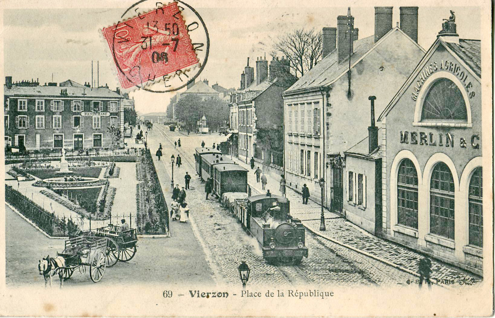 Carte postale ancienne éditée par BF à Paris, n° 69 : VIERZON : Place de la républiqueGros plan sur une rame des Tramways de l'Indre tractée par la locomotive 030T Pinguely n°9 (n° constructeur 137, construite en 1902)